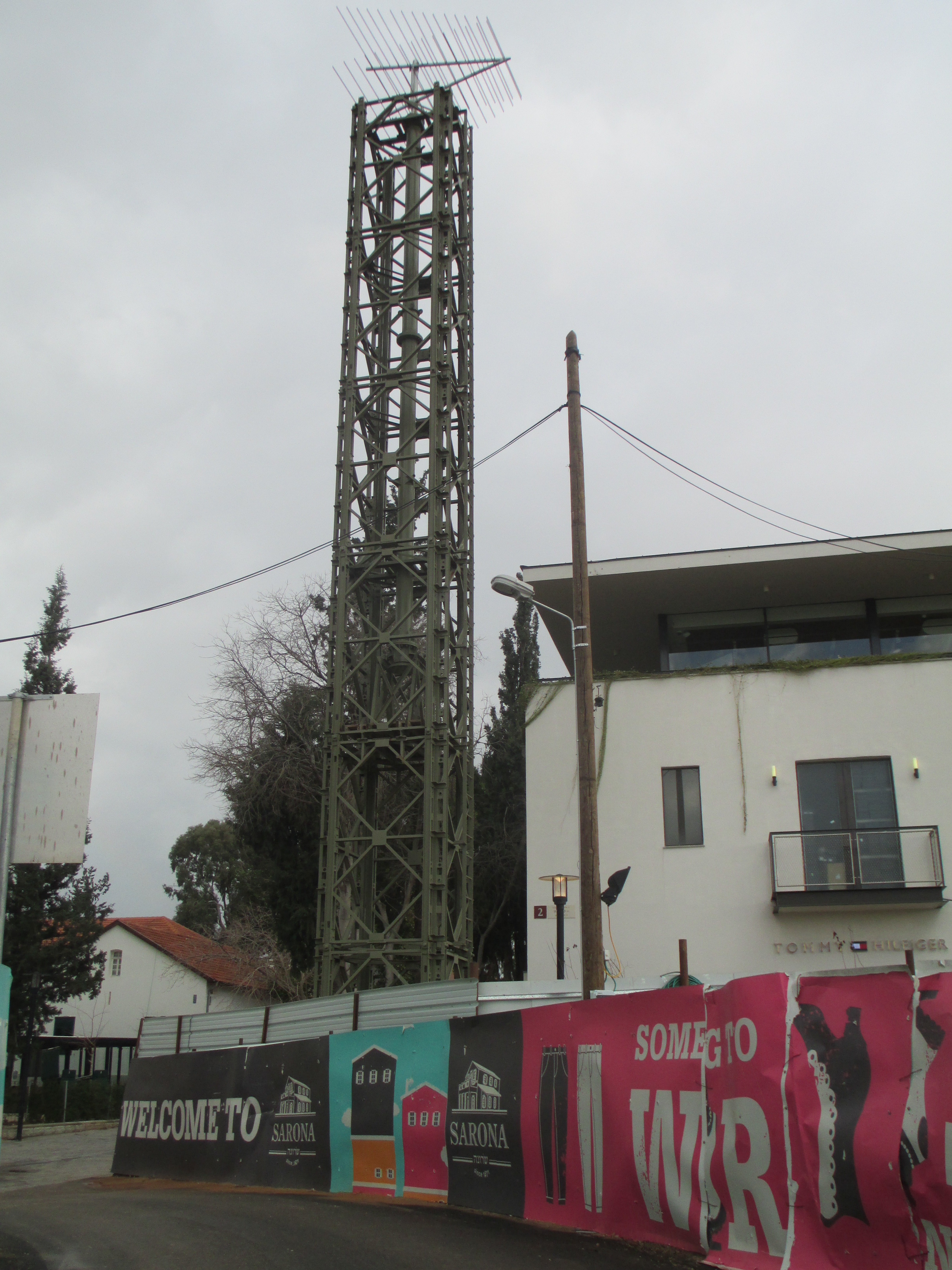 אנטנת המוסד במתחם שרונה